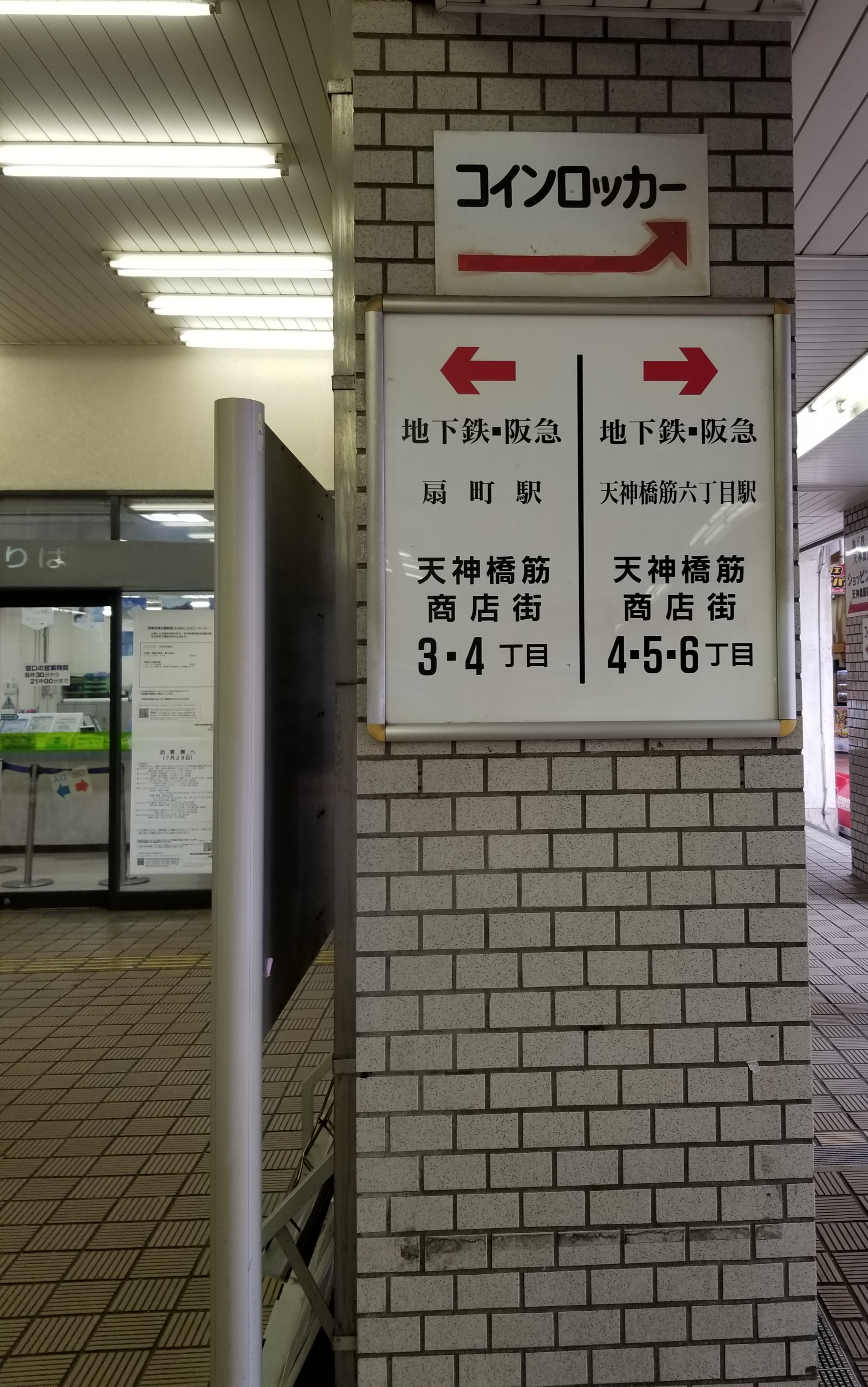 天満駅に掲示されている大阪市高速電気軌道堺筋線への乗換案内。JRと相互に乗換駅と指定している扇町駅 (大阪府)のみならず、天神橋筋六丁目駅への案内も掲示。堺筋線が直通する阪急電鉄も併記されている